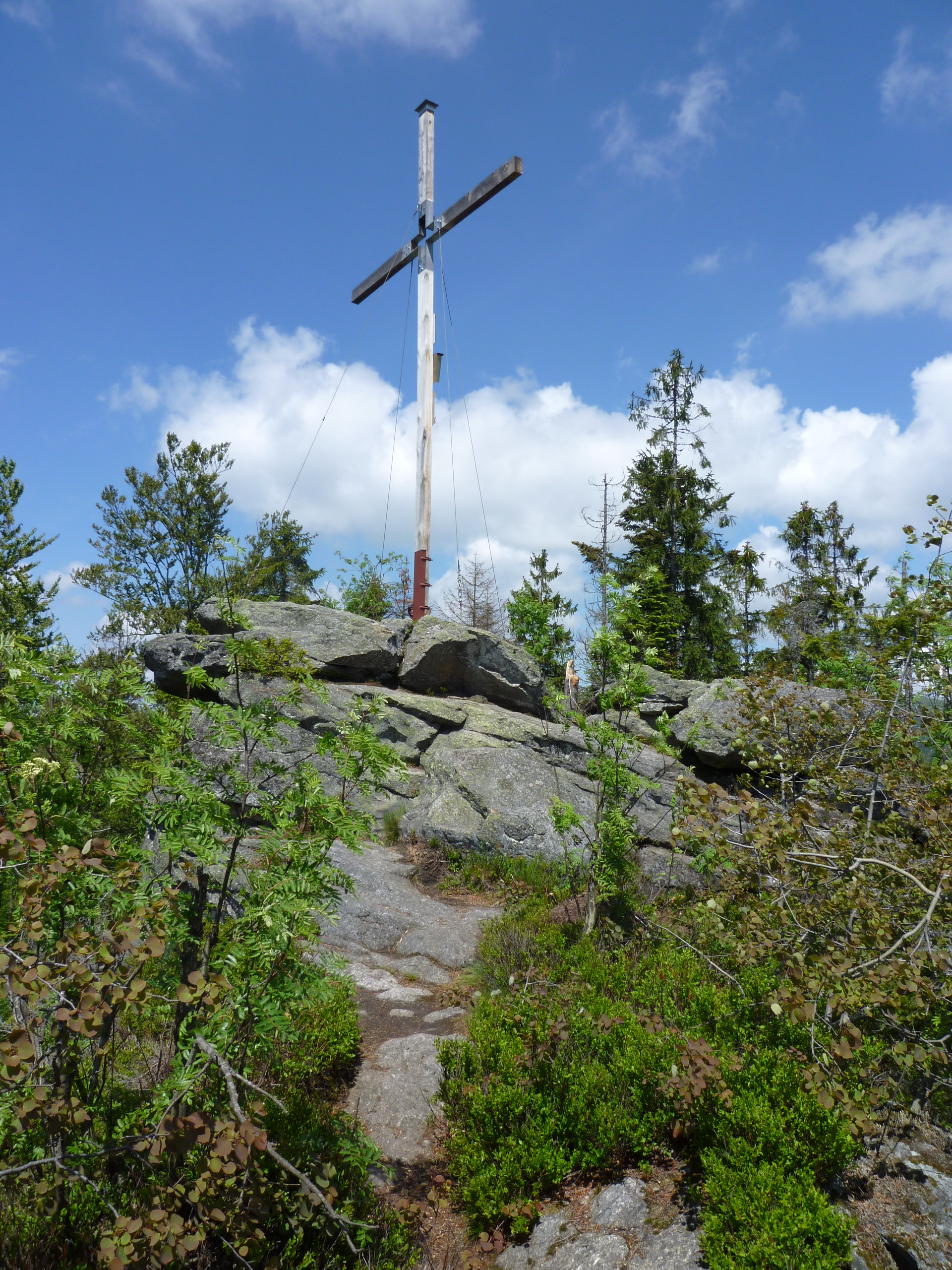 Die Große Kanzel ist ein Aussichtspunkt mit Gipfelkreuz im Nationapark Bayerischer Wald. Sie gehört zu den Geotopen im Landkreis Freyung-Grafenau mit der Nr. 272R013. Sie ist zugleich Naturdenkmal.